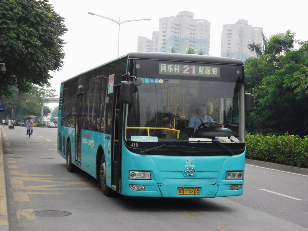 中文（香港）: 深圳公交21路，停靠世界之窗